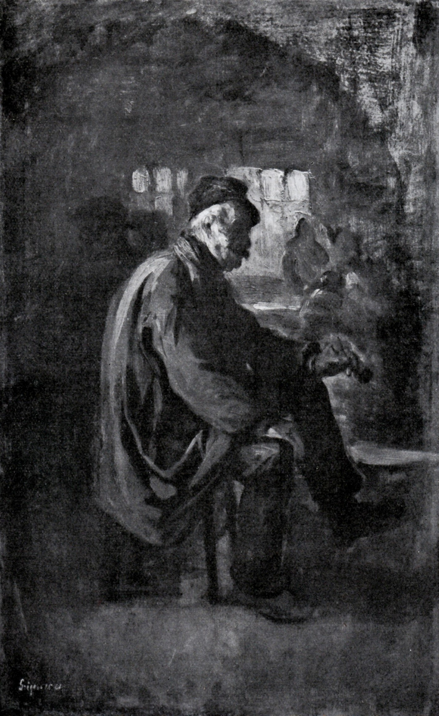 Paznicul de la Chailly, ulei pe pânză, foto alb/negru - Muzeul Național de Artă al României.